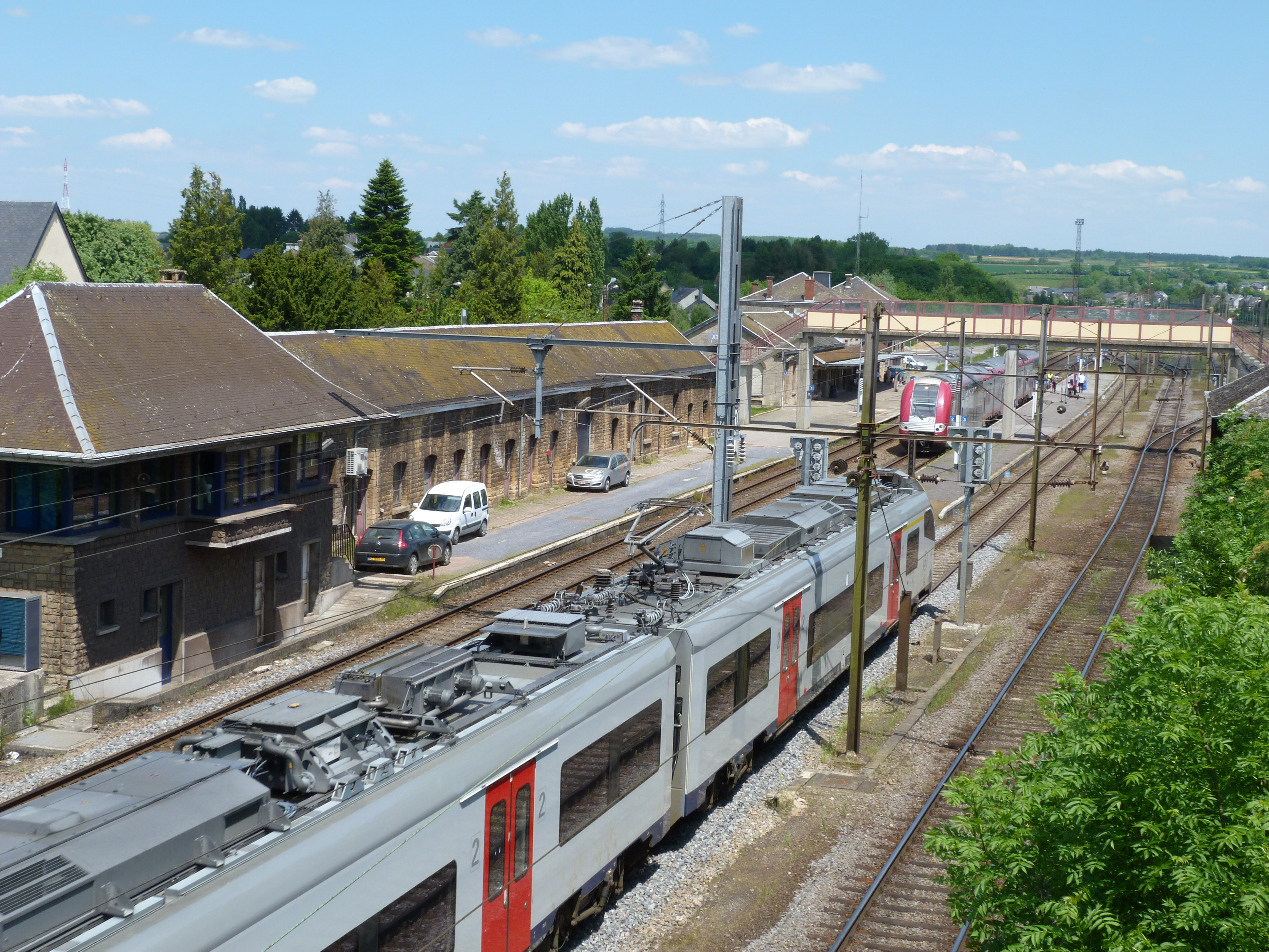 Entrée en gare d'Athus du train Desiro en provenance de Virton vers Arlon, en juin 2013.